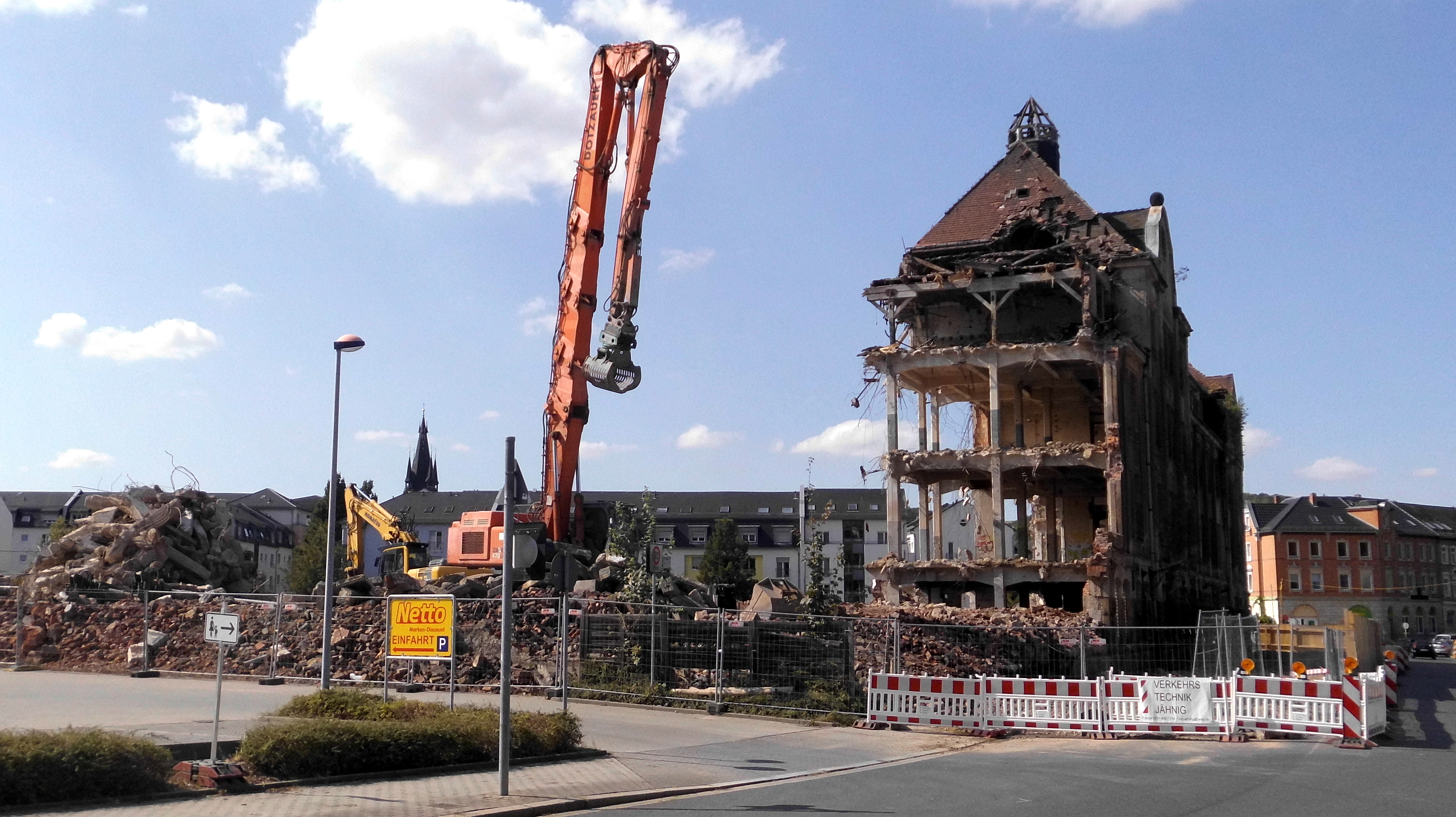 2019 Freital Abriss der Lederfabrik im September